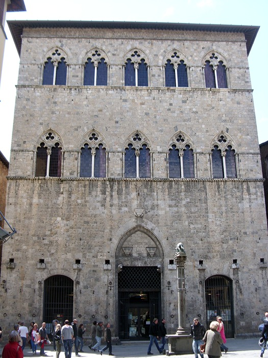 Siena - Palazzo Tolomei